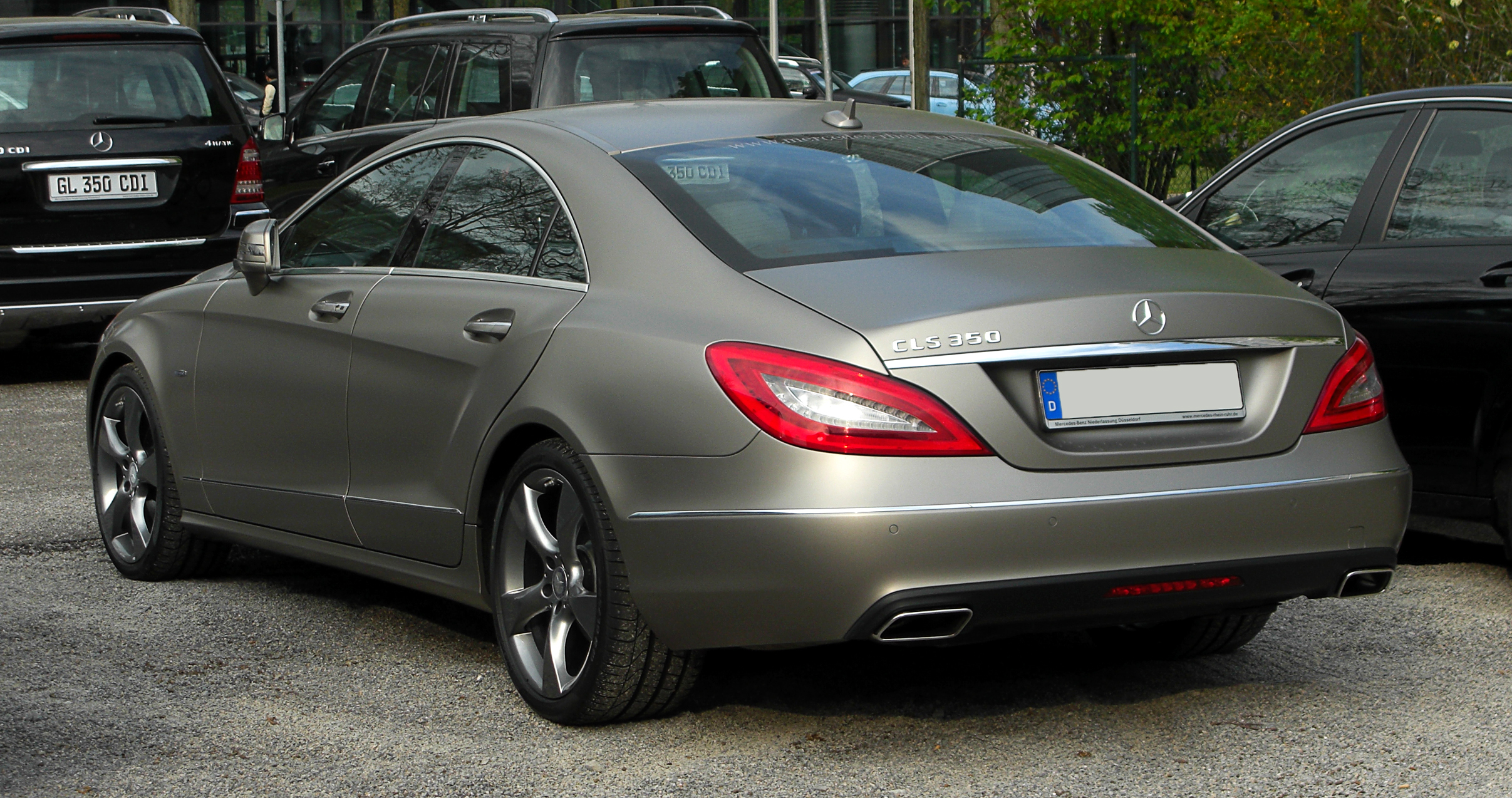 Mercedes-Benz CLS 350 BlueEFFICIENCY Edition 1 (C 218)